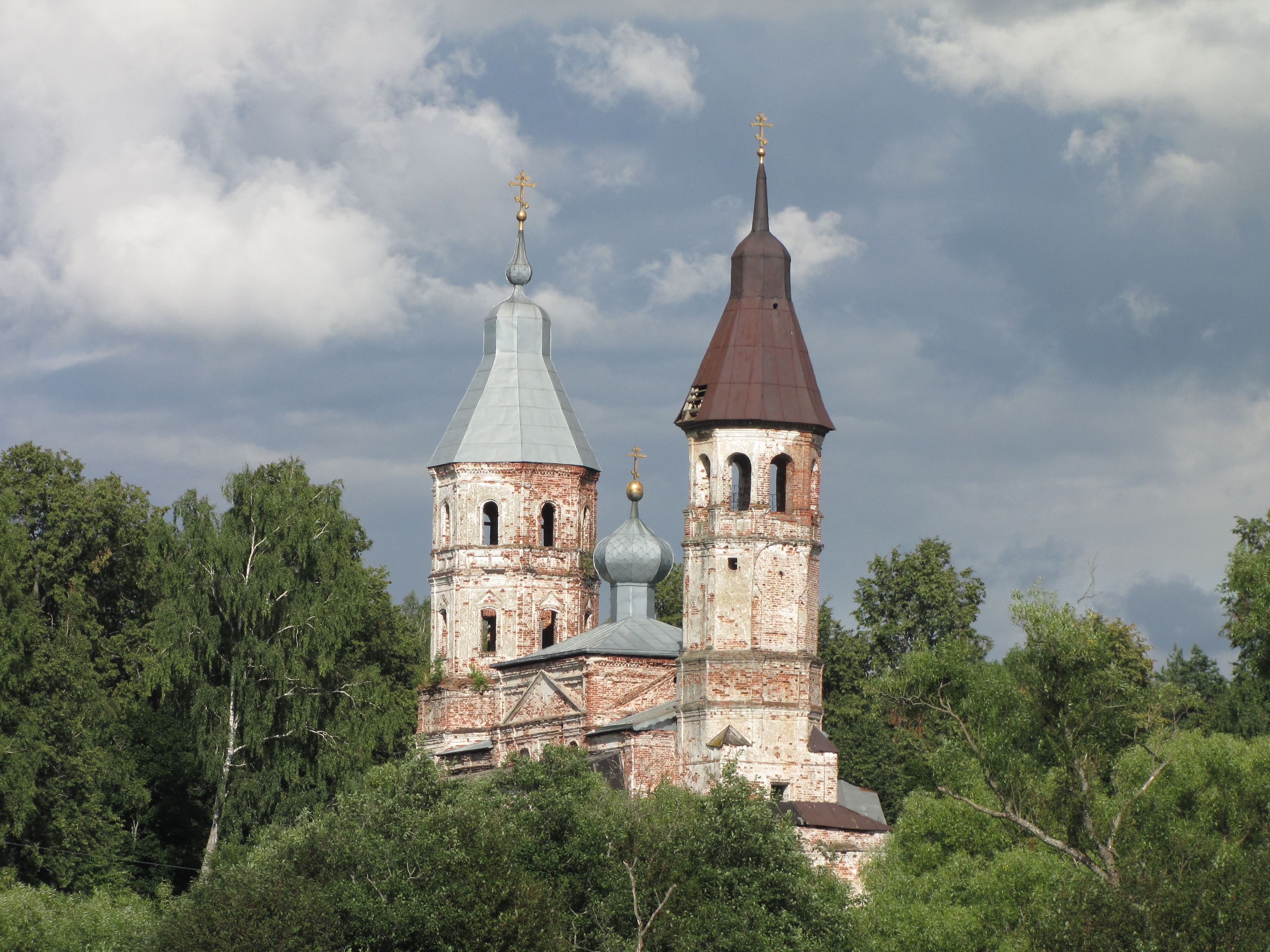 Церковь Преображения Господня (Владимирская область, Киржач, село Смольнево)Template:Культурное наследие России